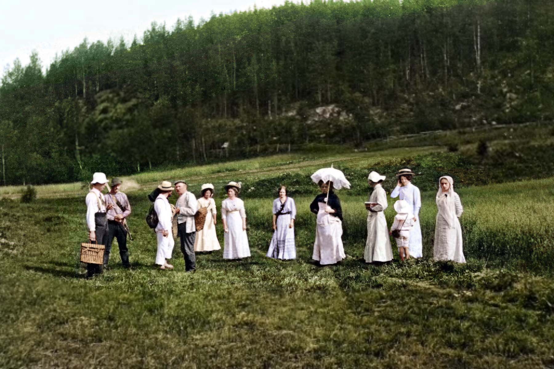 Пикник возле одной из сопок Харлу. 1909 год.